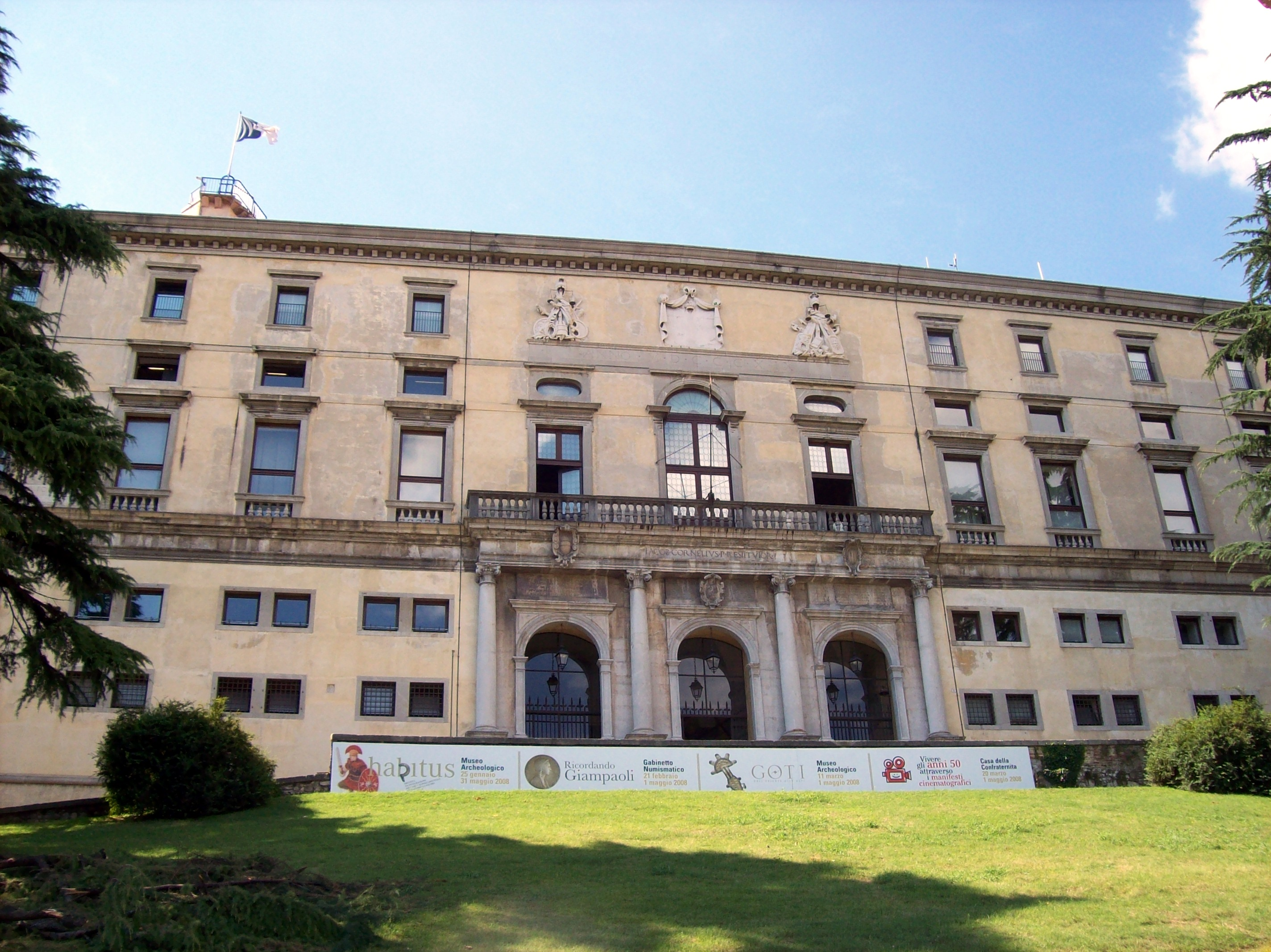 Castello di Udine, facciata anteriore